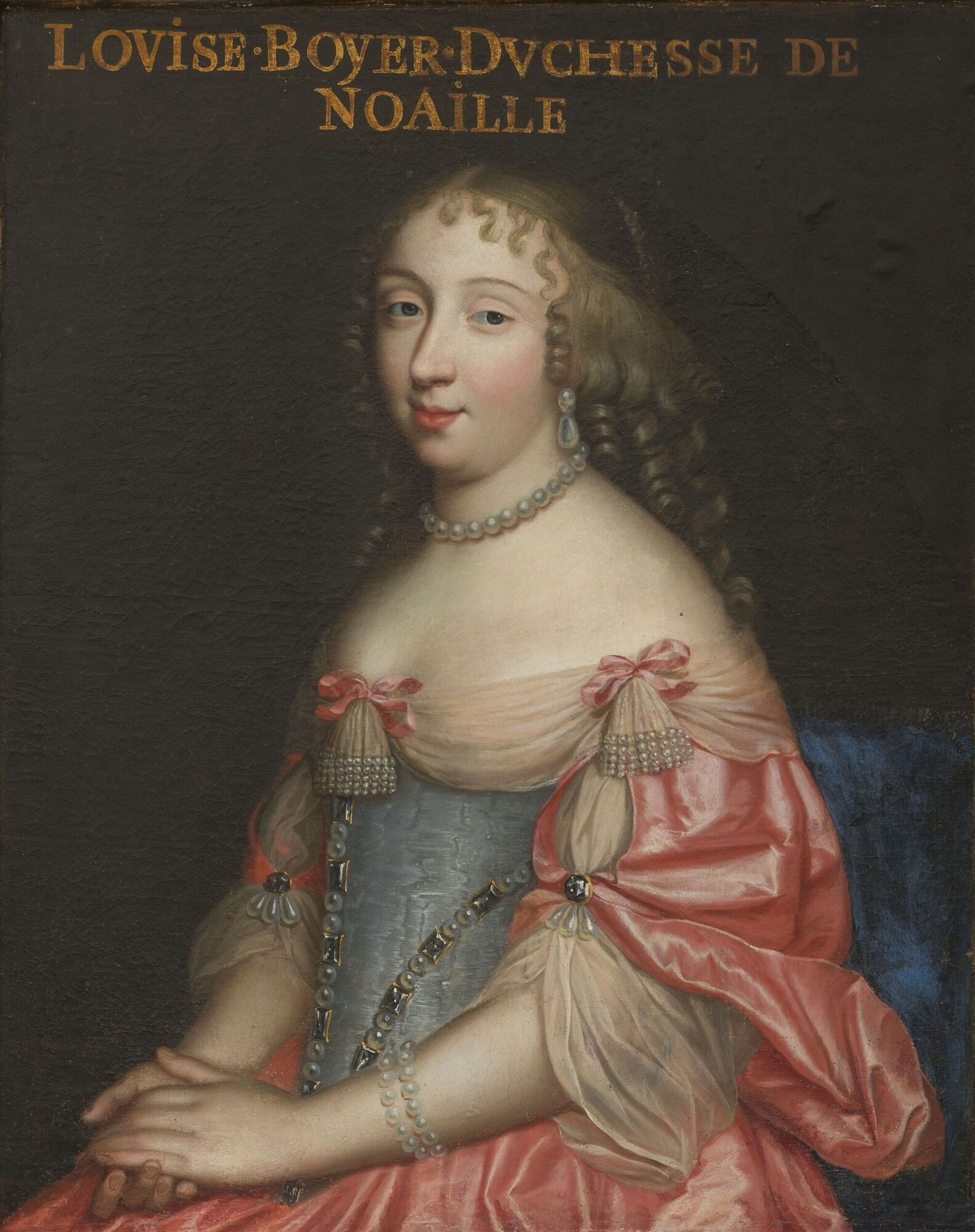 Louise Boyer (1632-1697), duchesse de Noailles